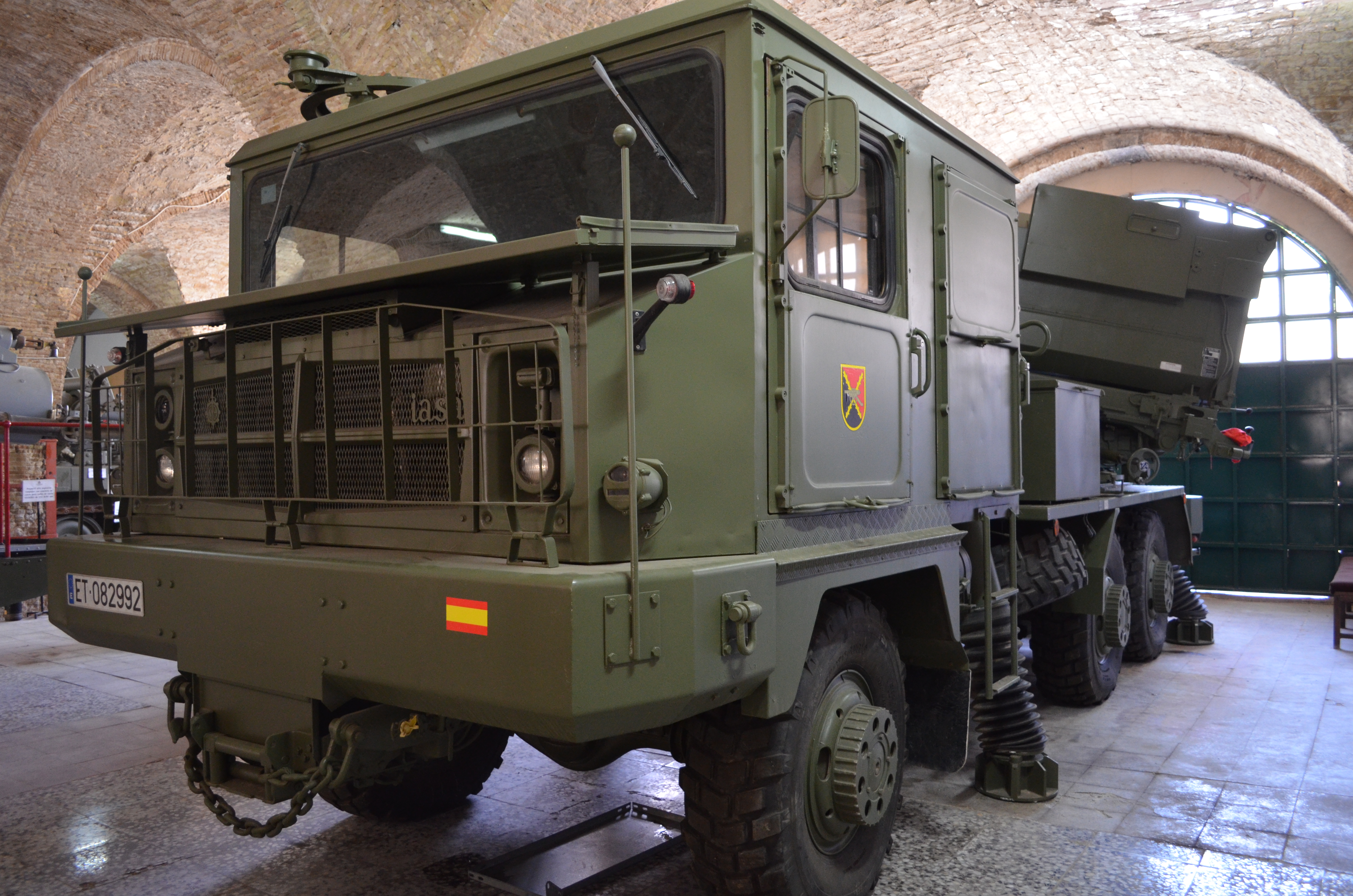 Lanzacohetes múltiple Teruel